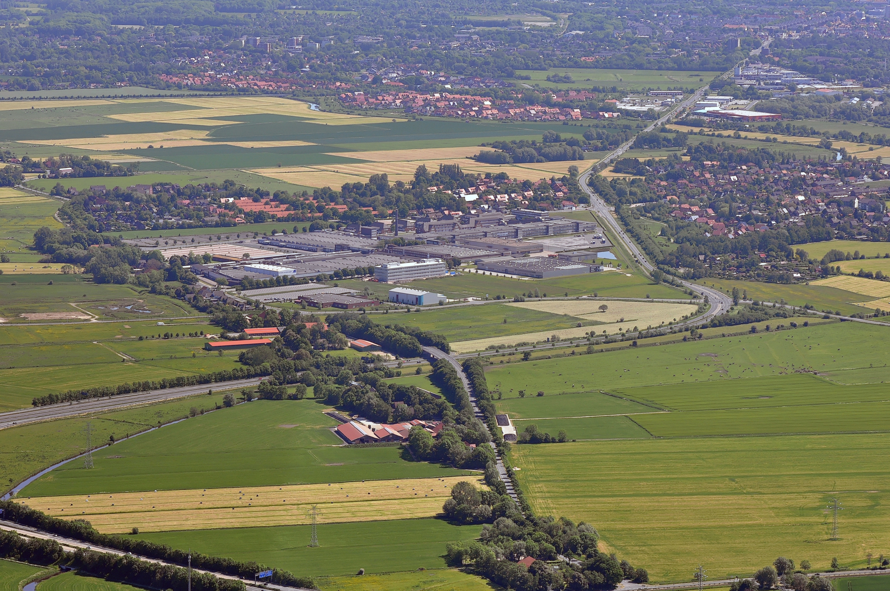 Luftbilder von der Nordseeküste 2012-05